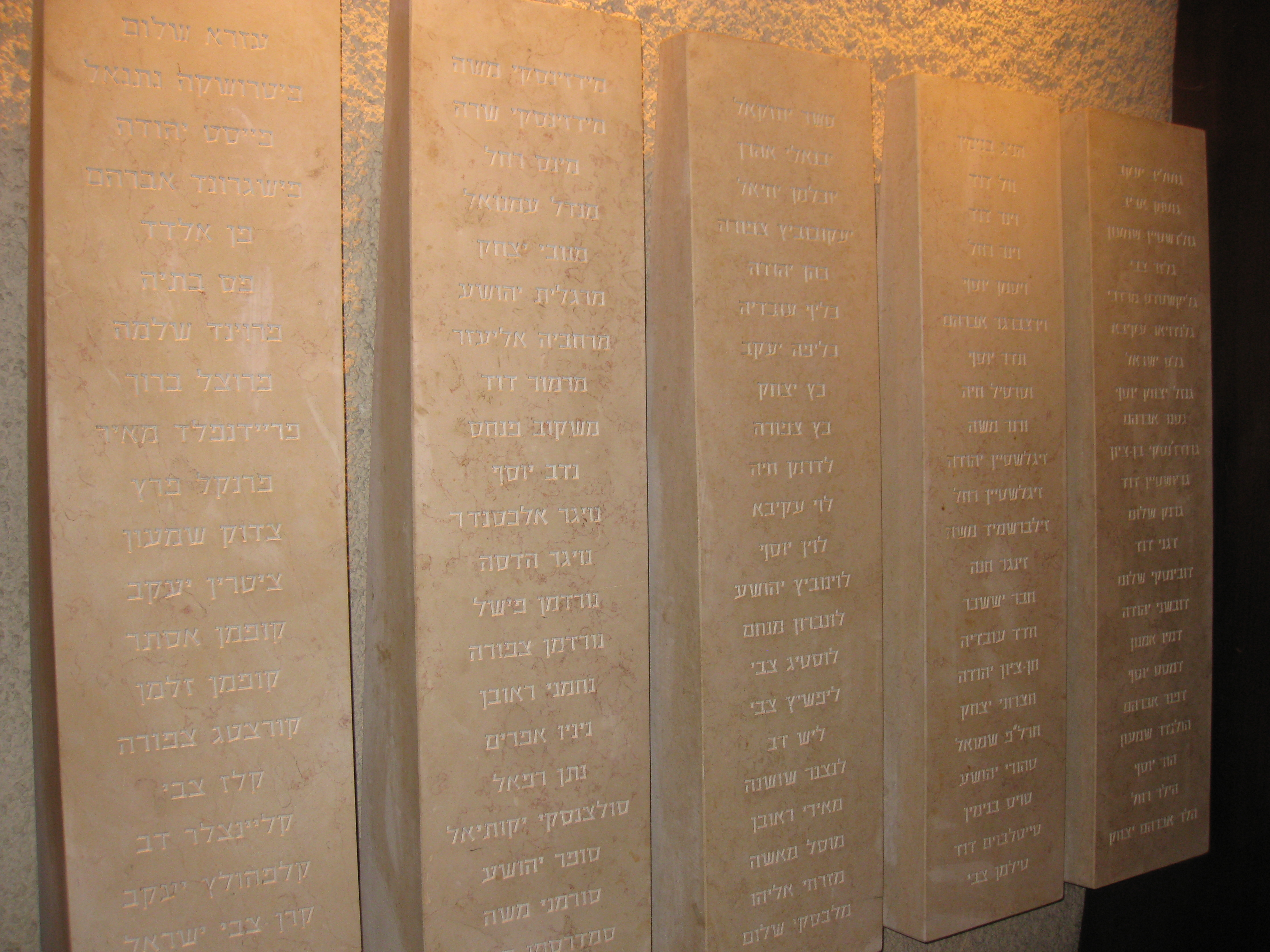 Kfar Etzion כפר עציון Kfar Etzion Memorial אתר ההנצחה בגוש עציון